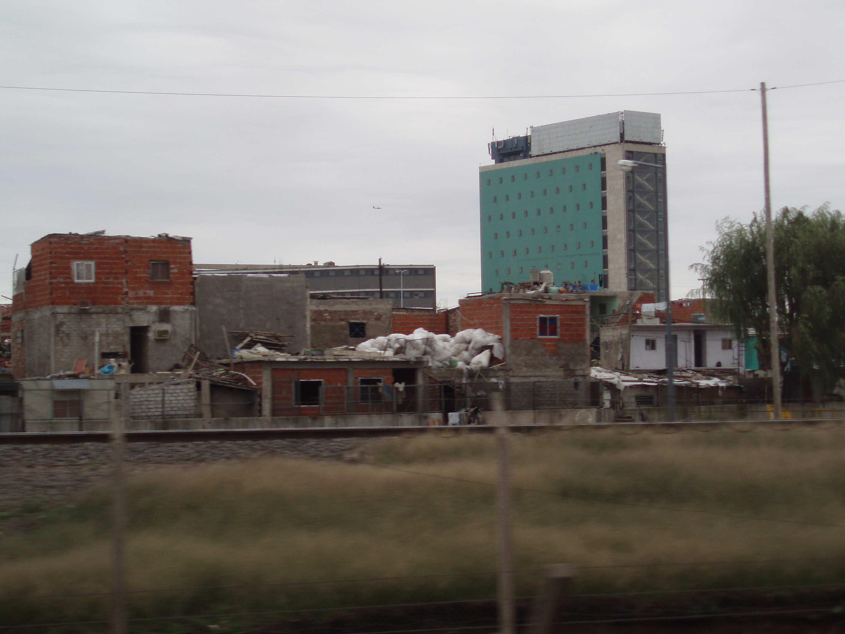 Vista de la Villa 31 y el Edificio Movimiento desde el Ferrocarril Belgrano Norte, en Buenos Aires.